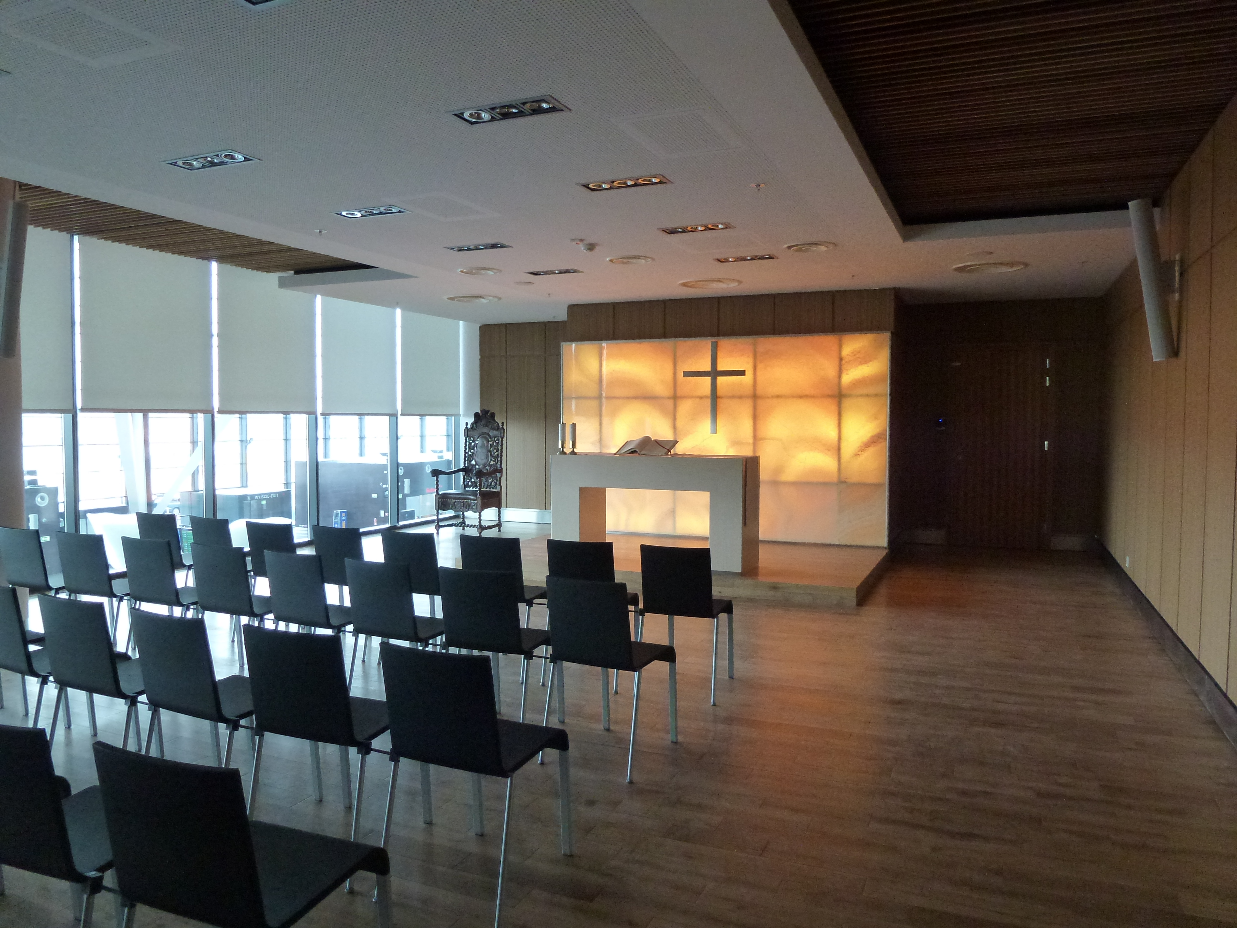 Gdańsk-Lotnisko im. Lecha Wałęsy-Terminal II-Kaplica